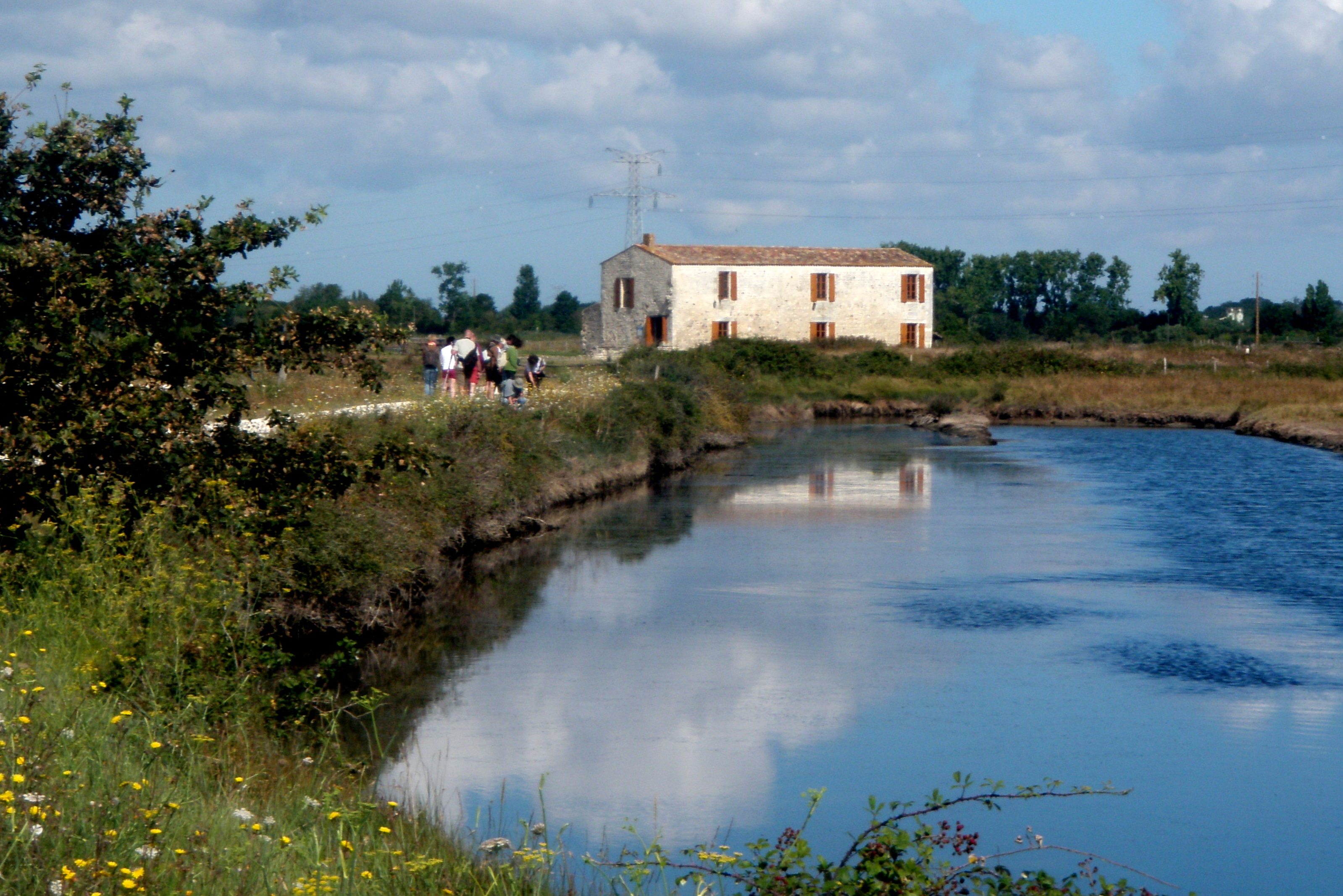 Moulin des Loges de Saint-Just-Luzac (Charente-Maritime)